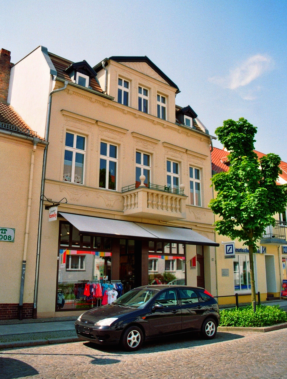 Denkmalgeschütztes Mietwohnhaus, heute mit Filiale der Modekette „Ernsting's Family“, Hauptstraße 31 in Lübben, Landkreis Dahme-Spreewald, Brandenburg, Deutschland.